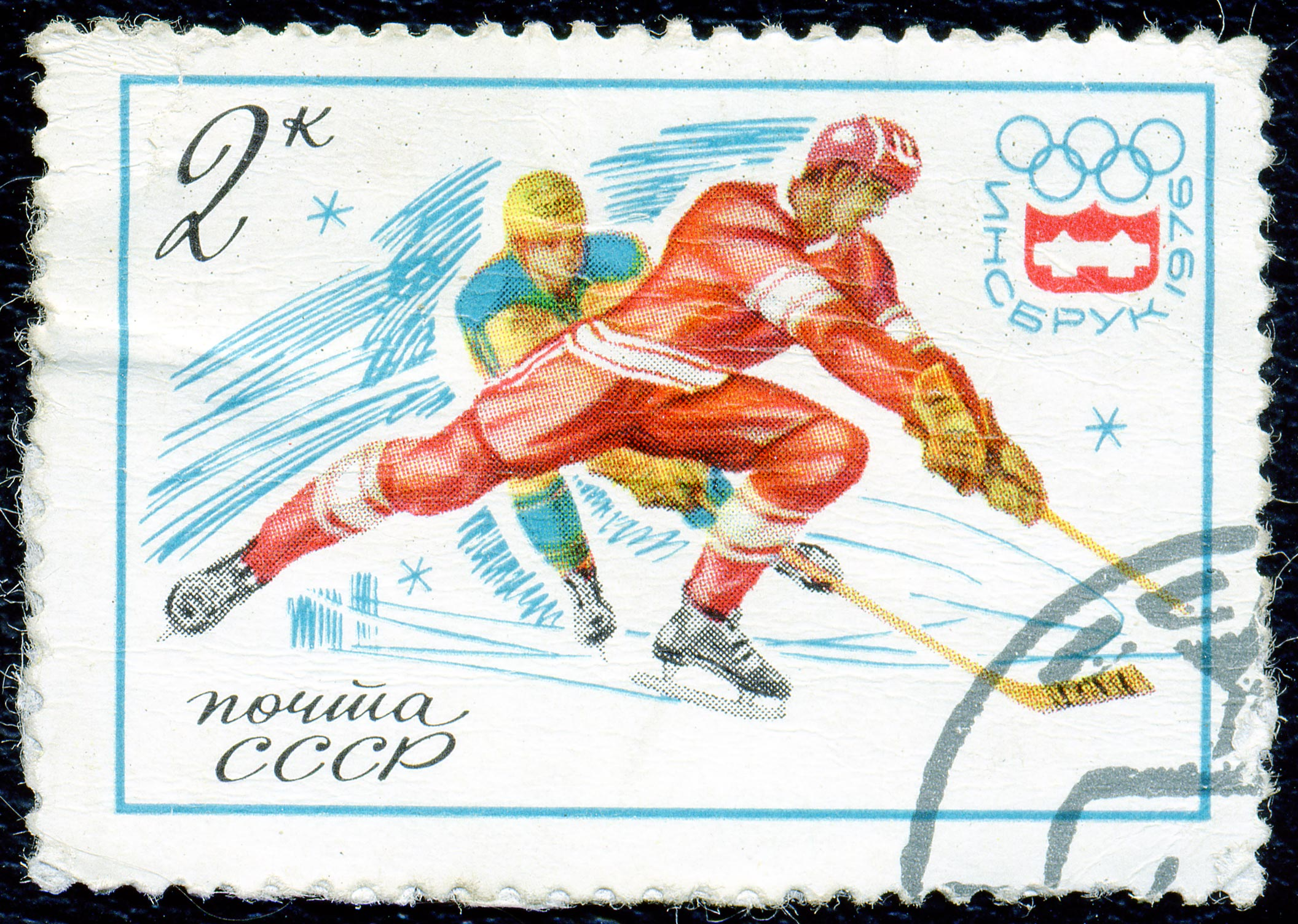 Почтовая марка СССР. 1976. XII Зимние Олимпийские игры. Хоккей